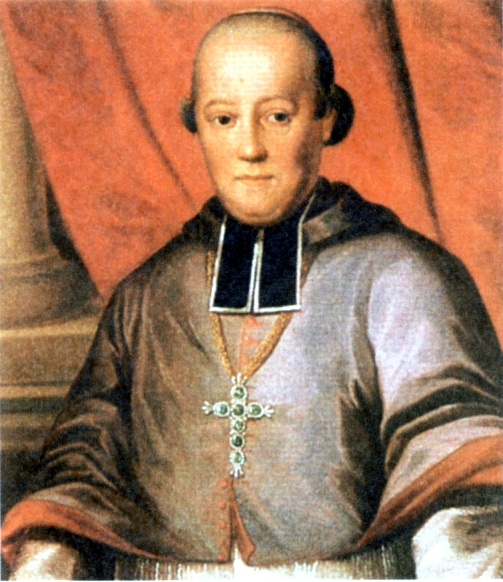 Ernest Johann Nepomuk von Herberstein (1731-1788), der erste Bischof der Diözese Linz